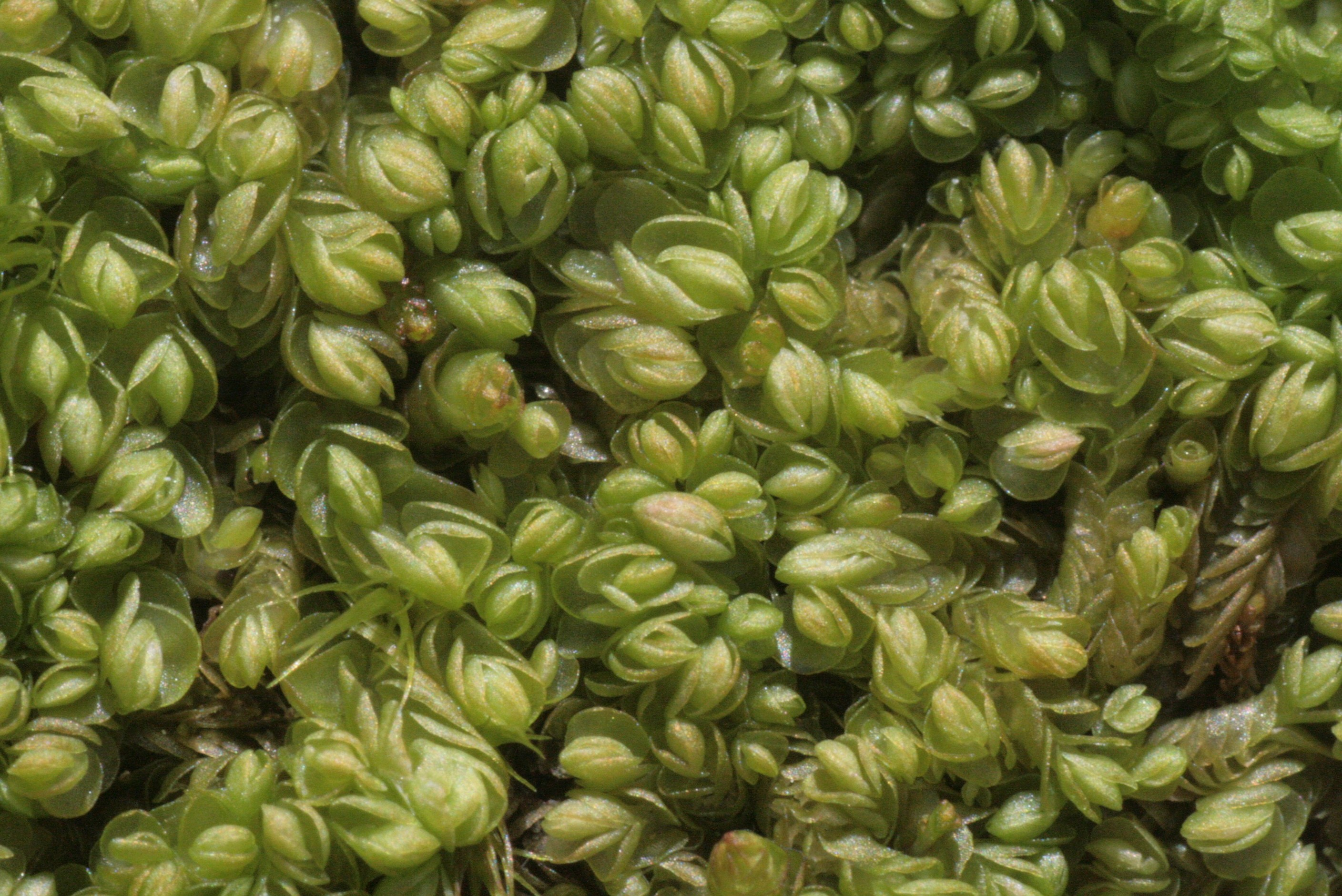 Nardia scalaris